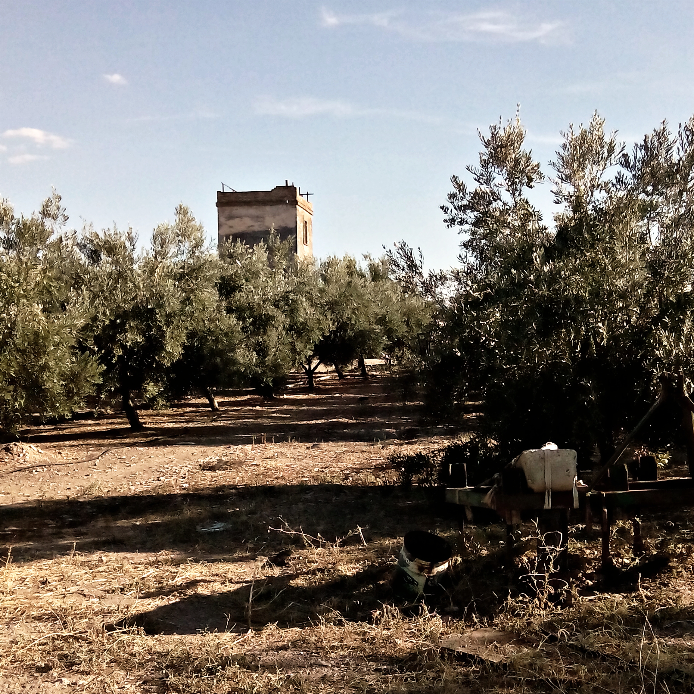 Torre "junca"